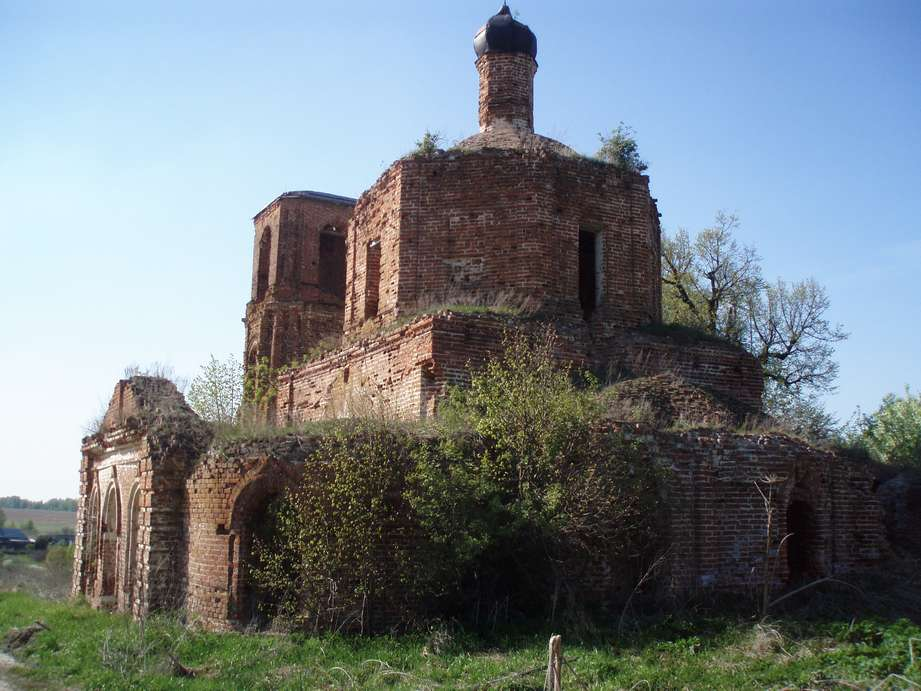 Церковь Иоанна Предтечи (Калужская область, Козельск, село Губино)